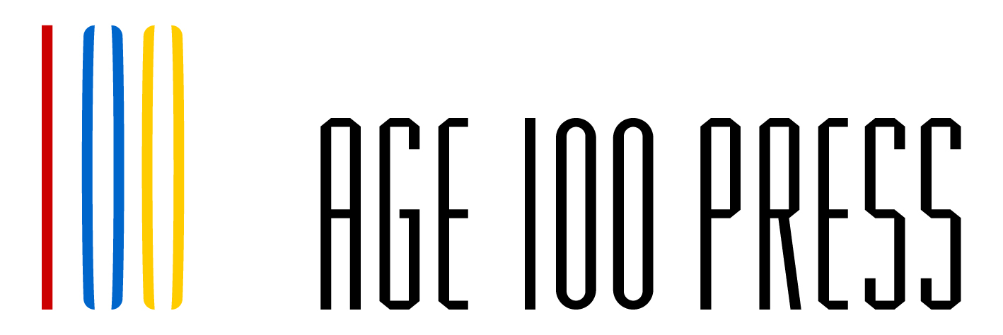 AGE100PRESSロゴ